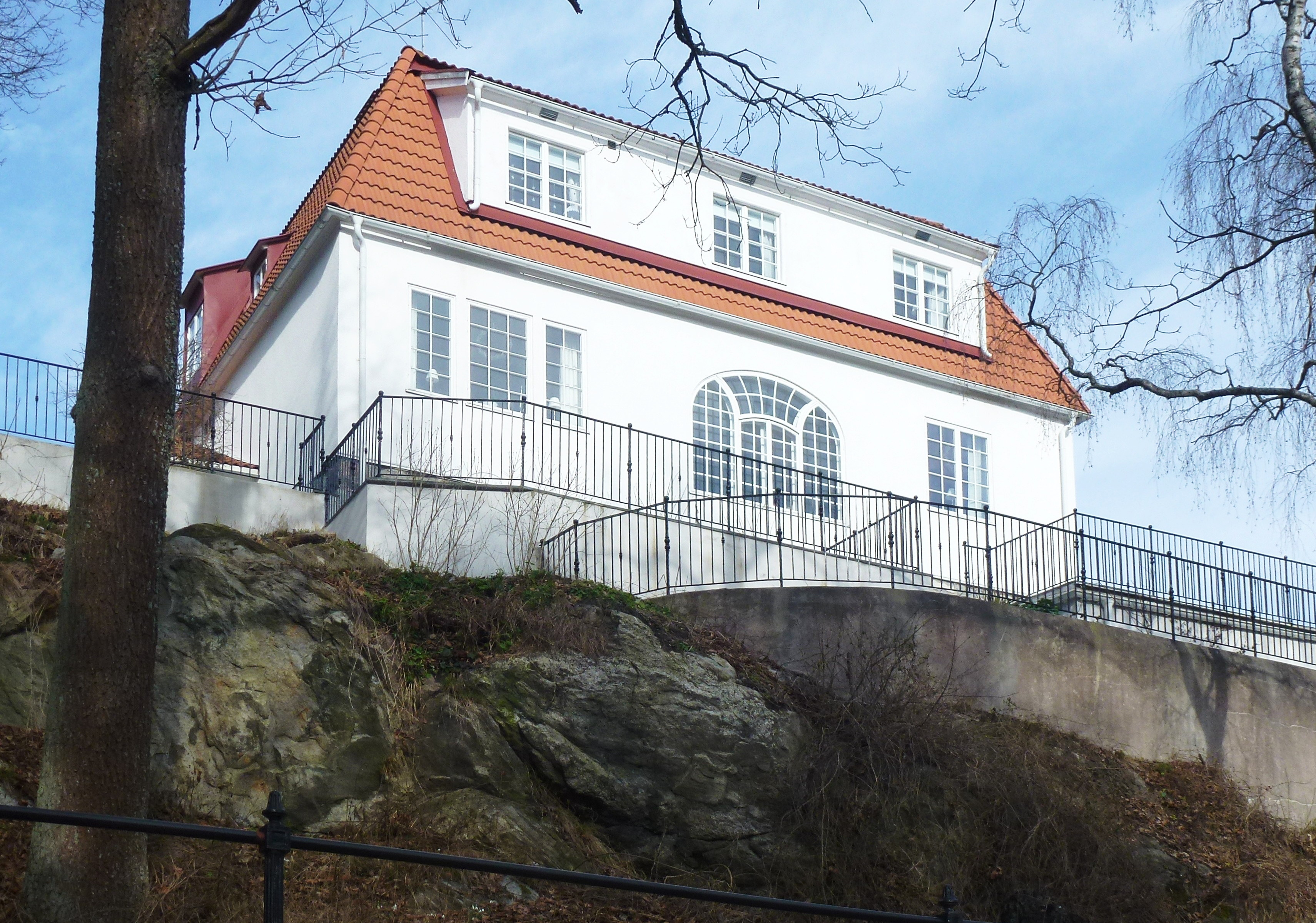 Villa Gärdesgården, Sturevägen 37, arkitekt Ragnar Östberg, byggherre Alf Wallander